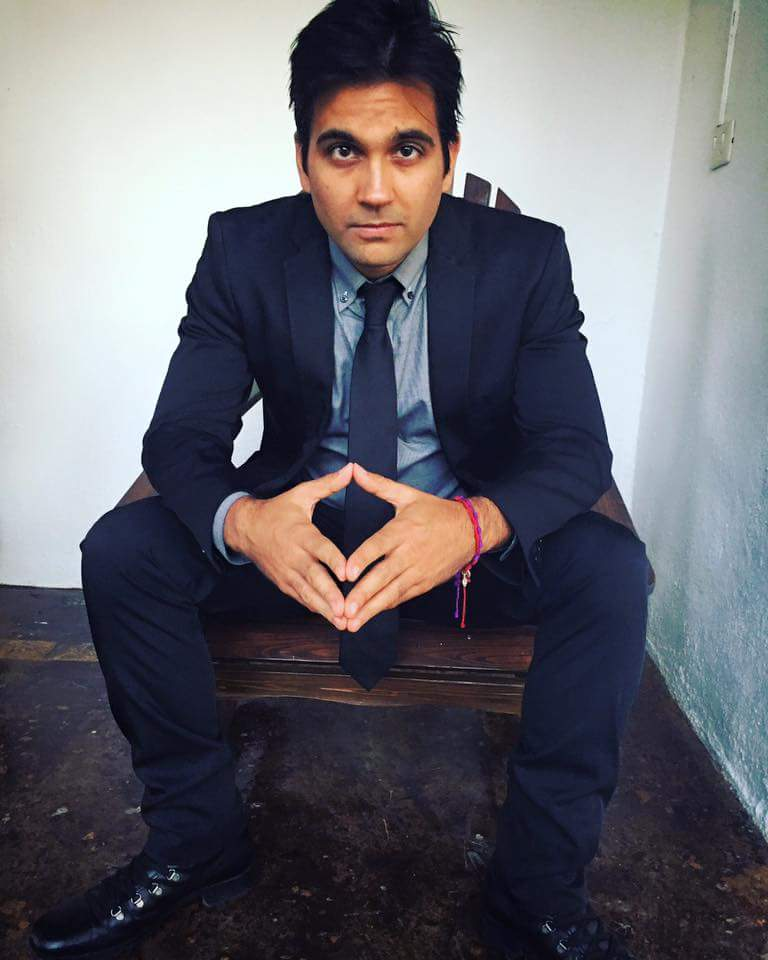 El actor Daniel Galo.